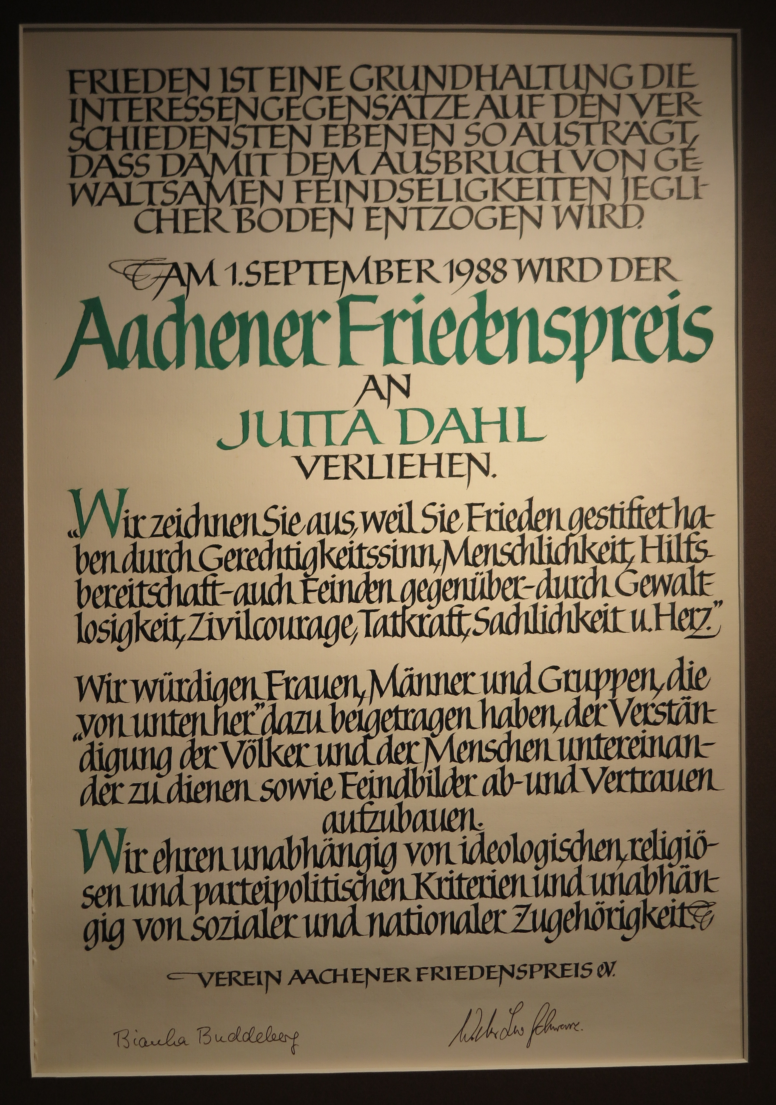 Urkunde der ersten Preisträgerin des Aachener Friedenspreises 1988, Jutta Dahl, im neuen Aachener Stadtmuseum „Centre Charlemagne”.